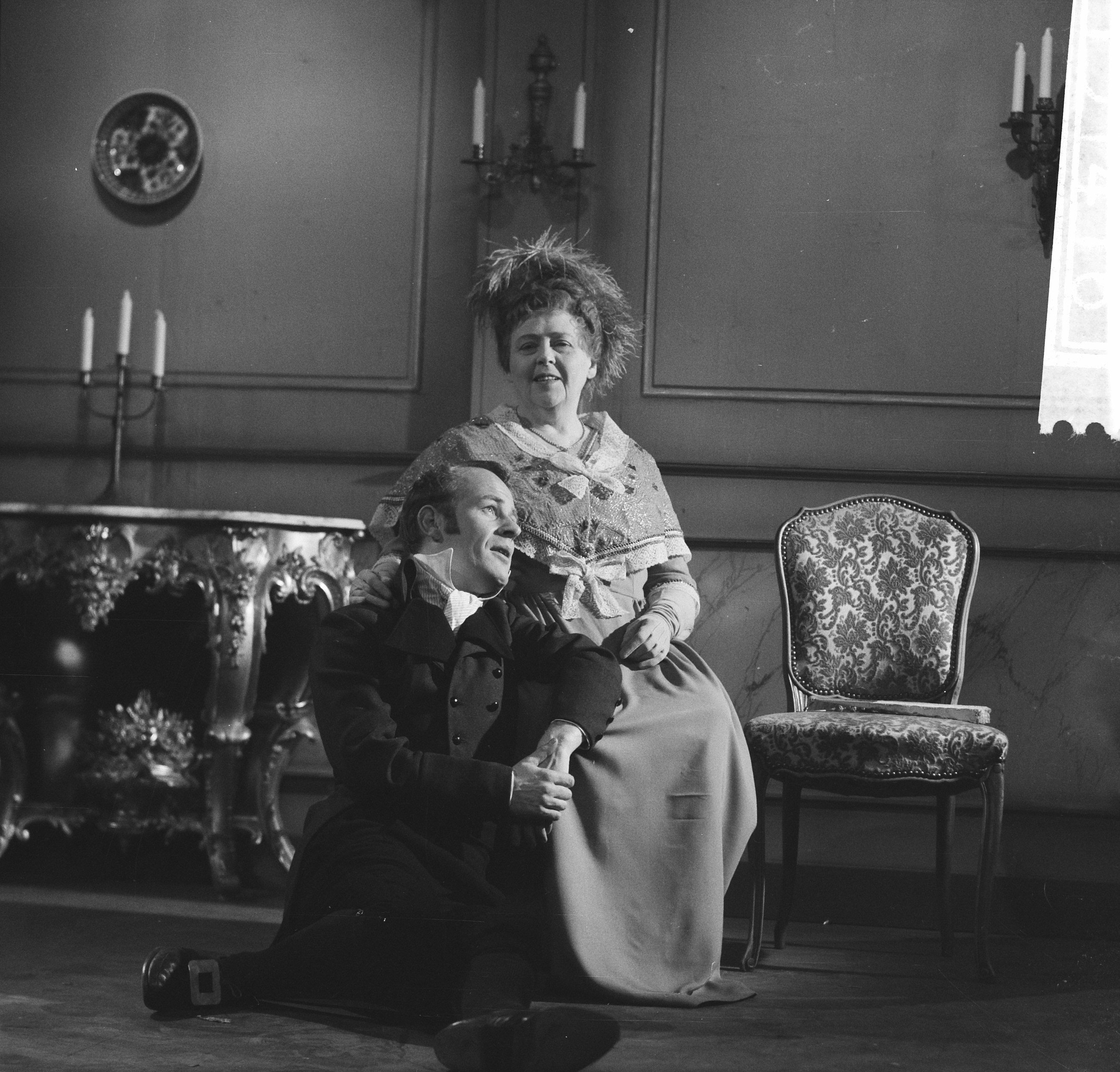 Collectie / Archief : Fotocollectie Anefo Reportage / Serie : [ onbekend ] Beschrijving : NCRV-televisiespel "De vier dochters Bennet". Mien Duymaer van Twist en Ab Abspoel? Annotatie : Nederlandse bewerking van de roman "Pride and Prejudice" van Jane Austen Datum : 5 november 1961 Trefwoorden : televisiedrama's Persoonsnaam : Duymaer van Twist, Mien Fotograaf : Nijs, Jac. de / Anefo Auteursrechthebbende : Nationaal Archief Materiaalsoort : Negatief (zwart/wit) Nummer archiefinventaris : bekijk toegang 2.24.01.03 Bestanddeelnummer : 913-1416